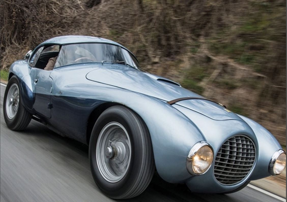 FERRARI 1951 IL MIO PRIMO AMORE A 14 ANNI